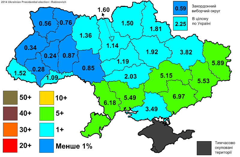 Електоральна підтримка Рабіновича Вадима Зіновійовича на виборах Президента України 2014.